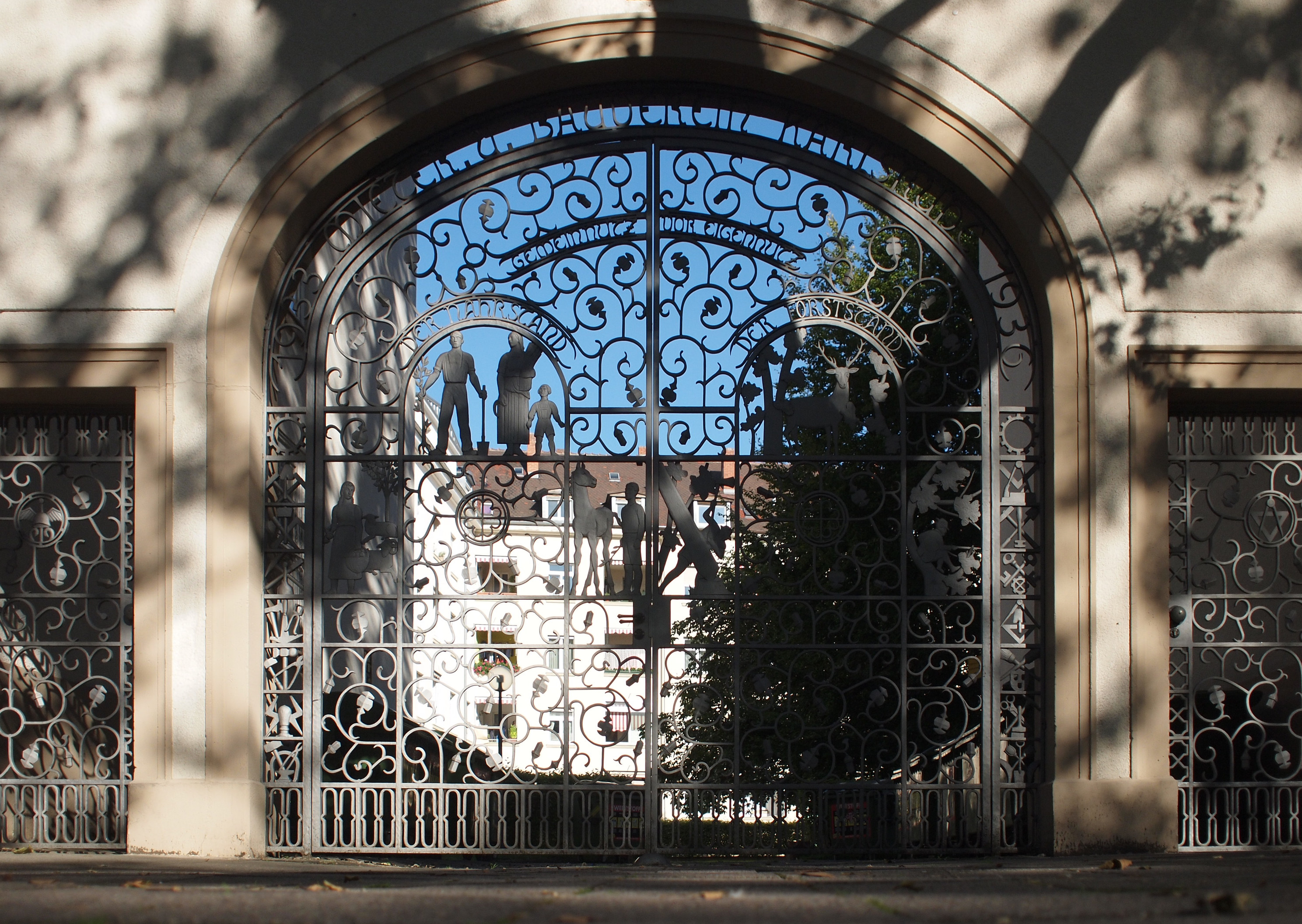 Linkes Tor des Meidingerblocks in Karlsruhe, Architekt: Emil Brannath